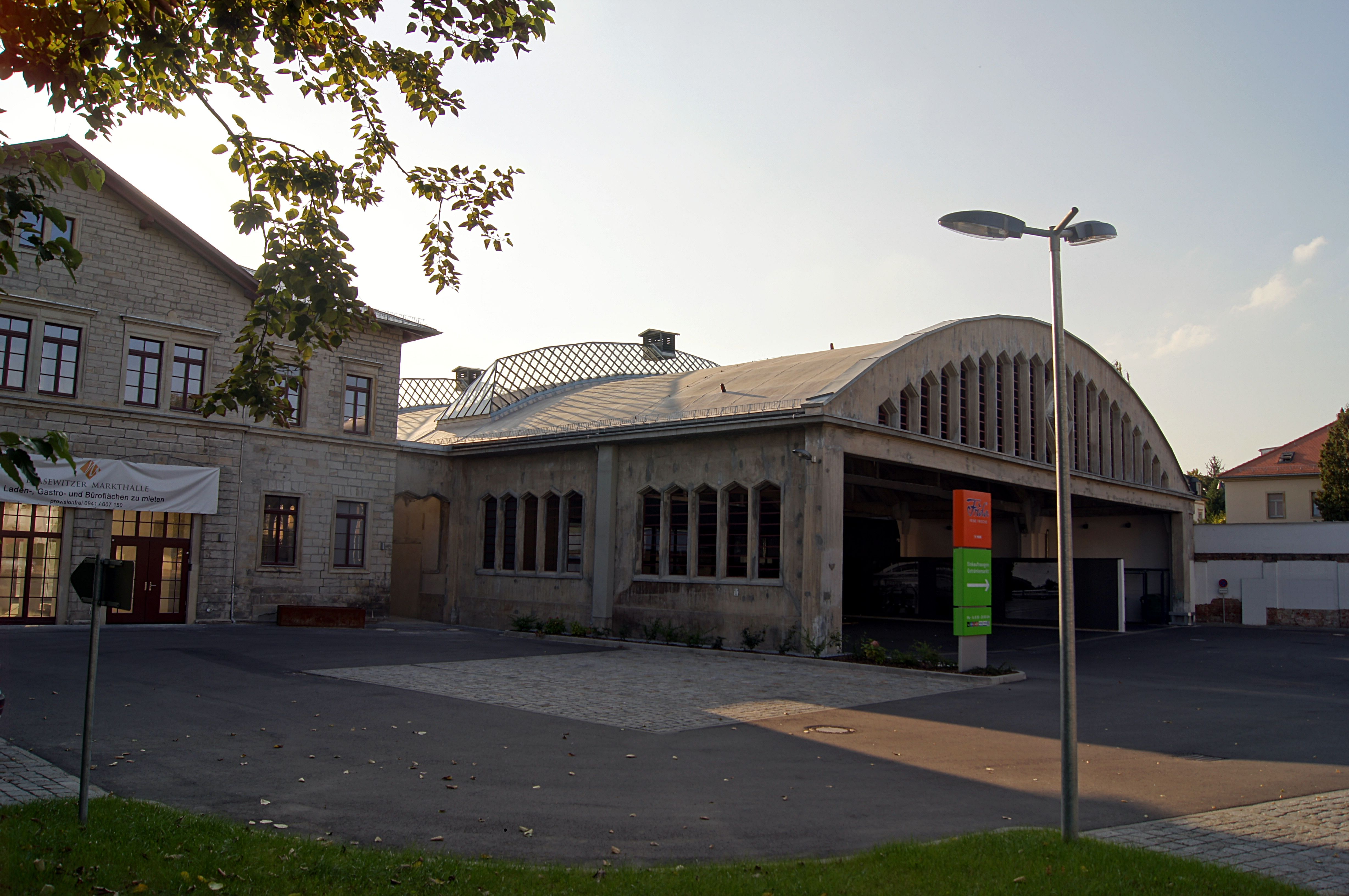 Ehemaliger Busbetriebshof an der Tolkewitzer Straße, jetzt Konsum/Frieda.